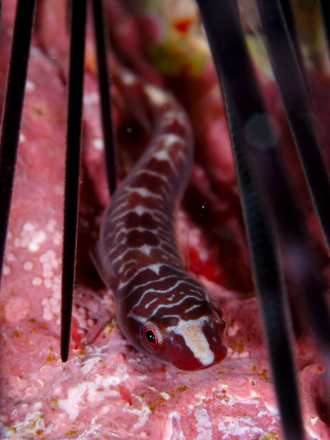 ホソウバウオ Pherallodus indicus